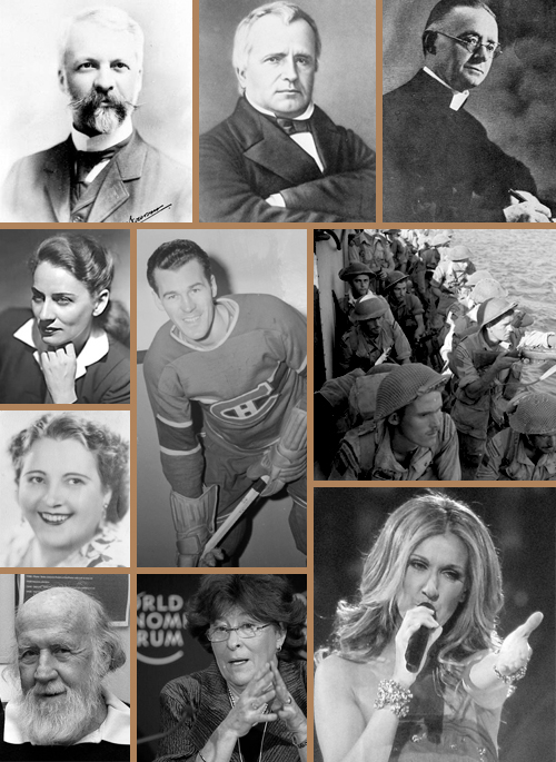 Montage réalisé à partir des œuvres suivantes